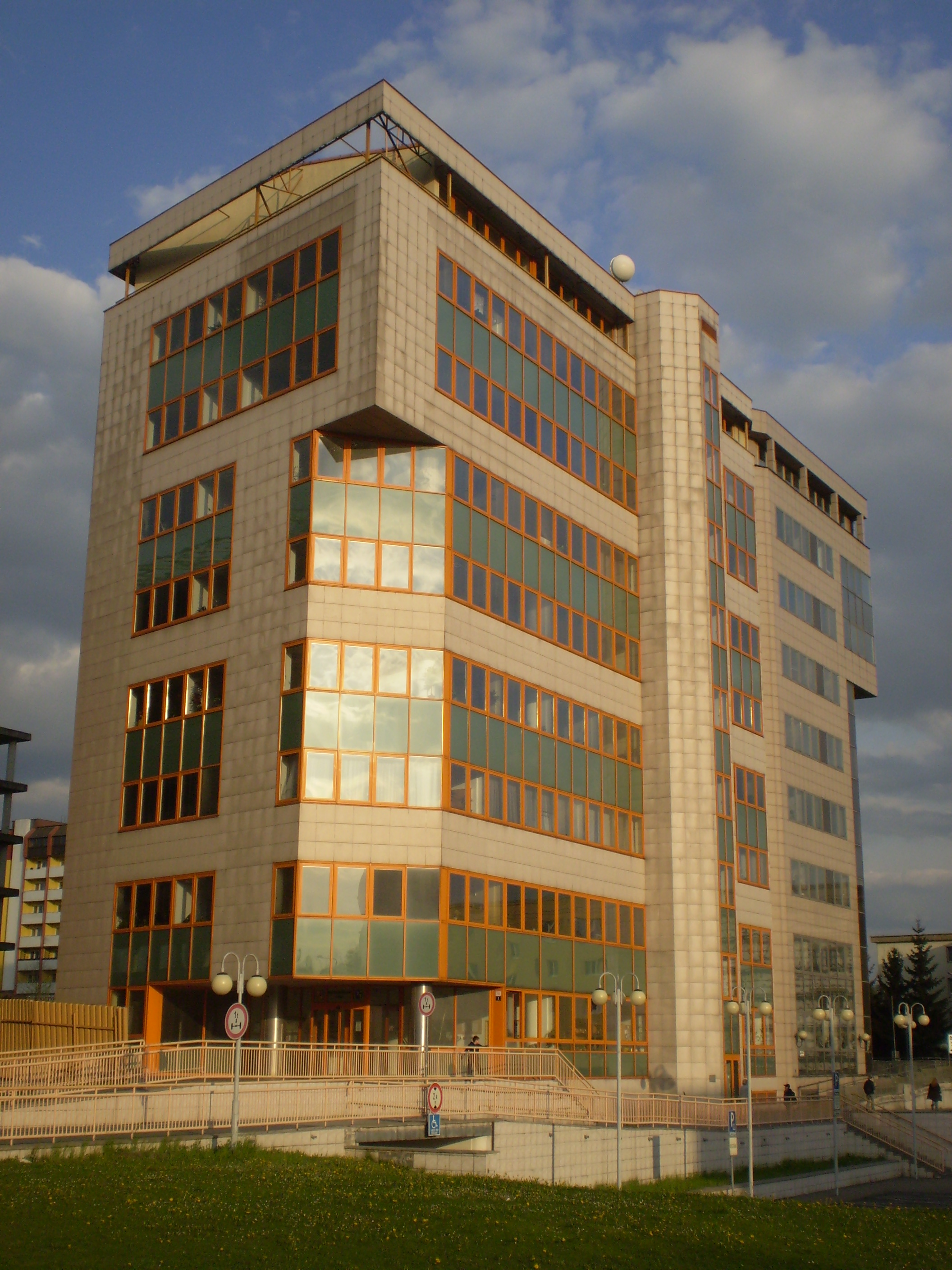 Finanční úřad v Ostravě (na zastávce Krajský úřad).